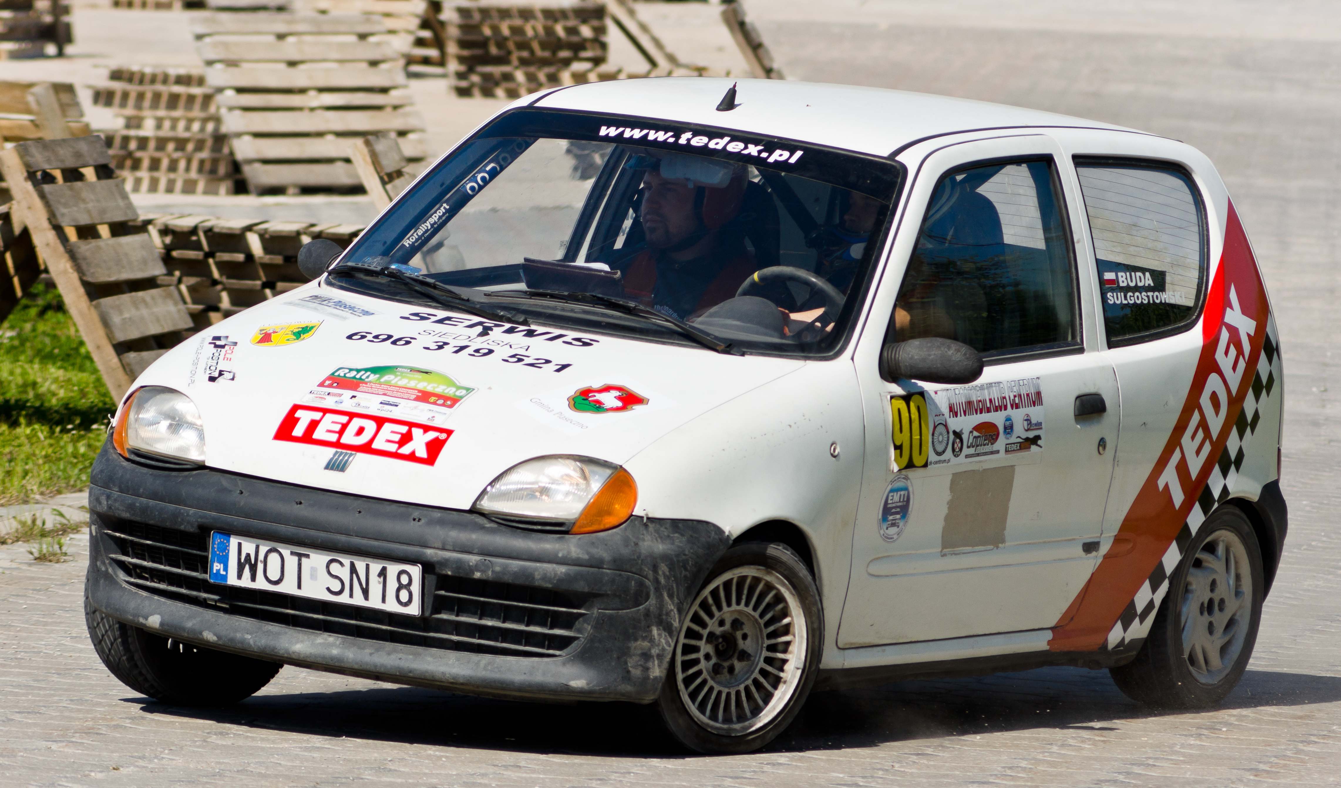 Wyścig VII Rally Piaseczno 2012, OS Gąski, Fiat Seicento, nr startowy 90, kierowca Dominik Buda, pilot Lubomir Sulgostowski.